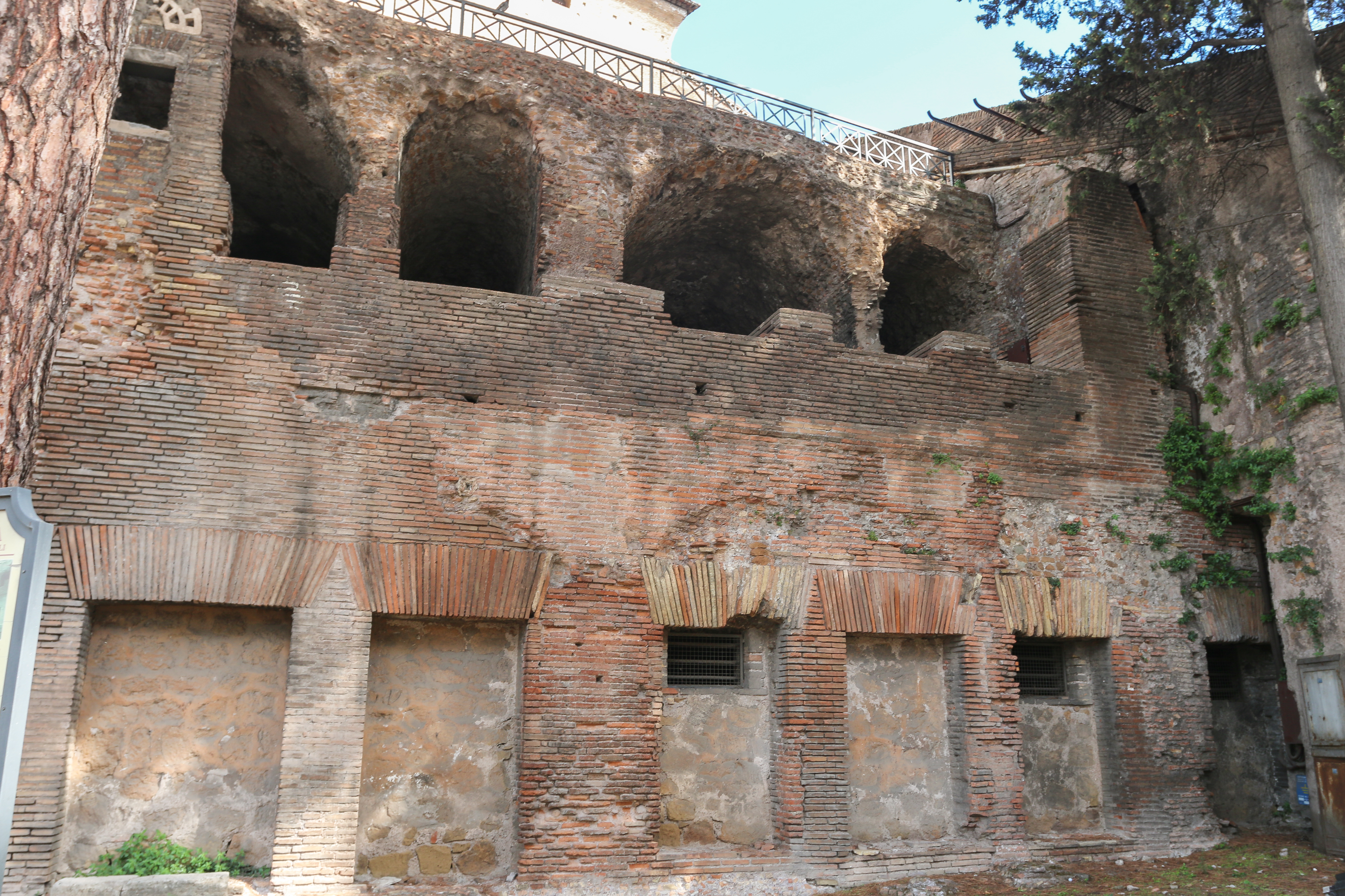 Außenansicht der Aracoeli Insula